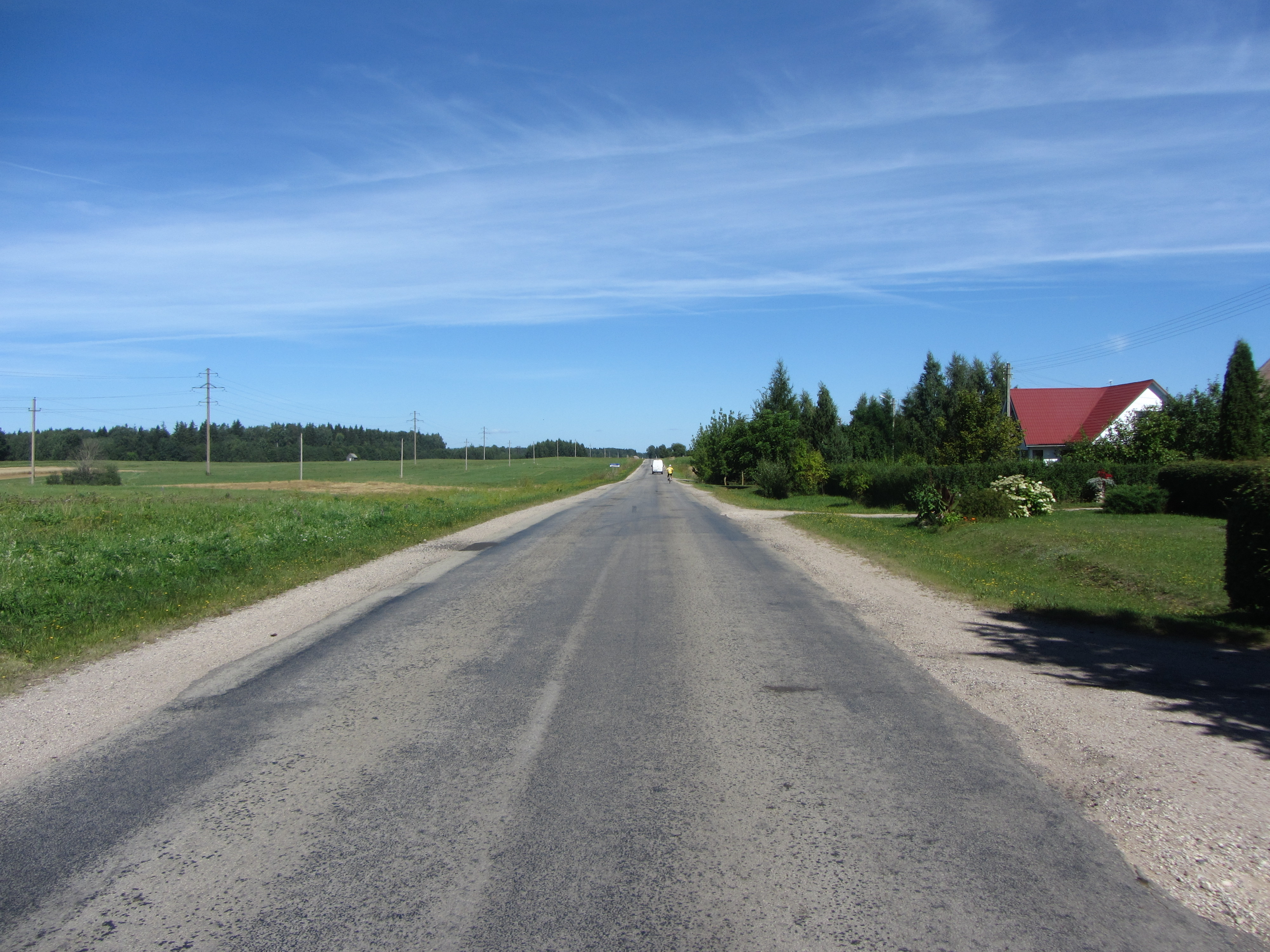 Laibgaliai, Lithuania